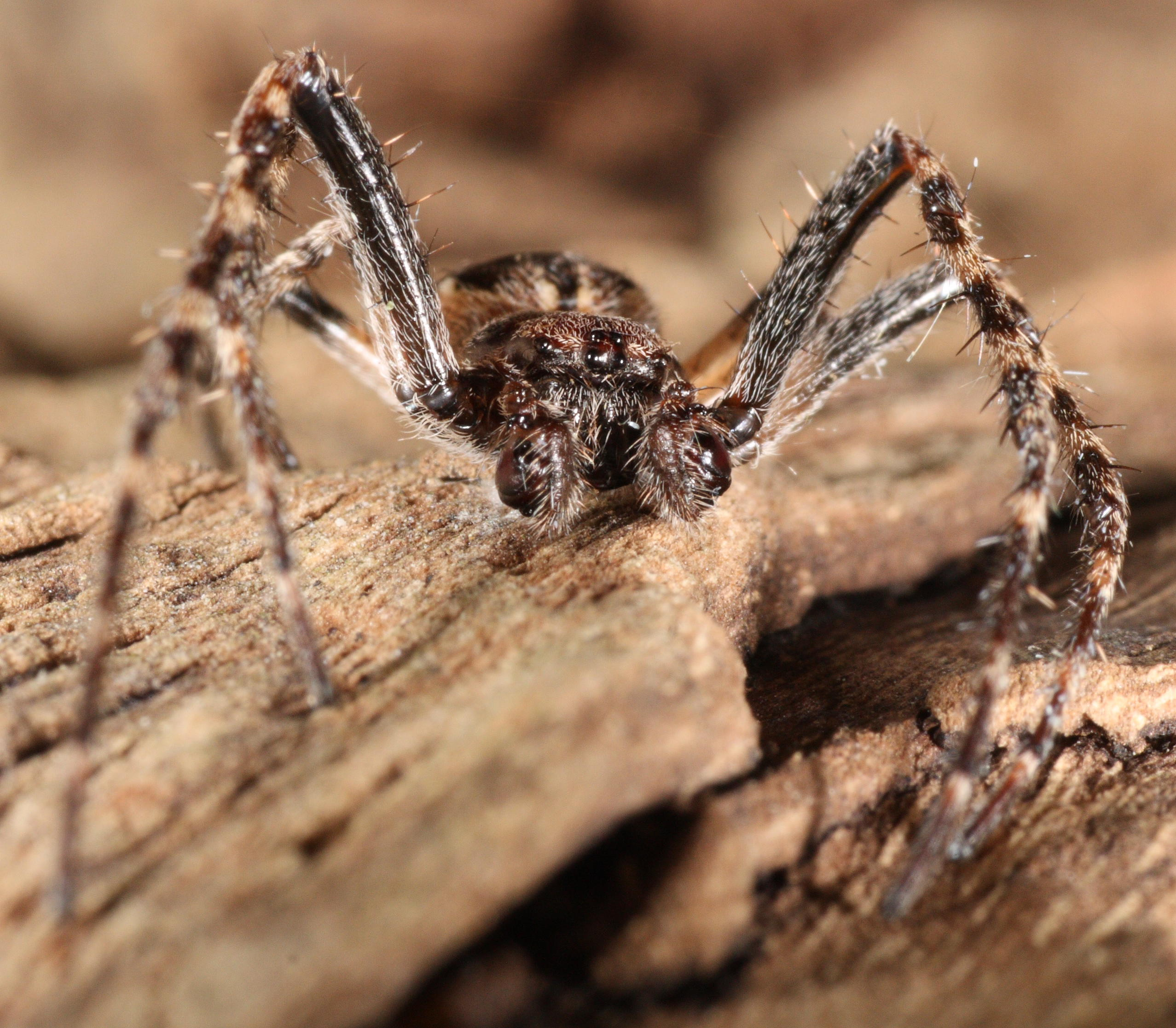 Nattvever Nuctenea umbratica hann forfra